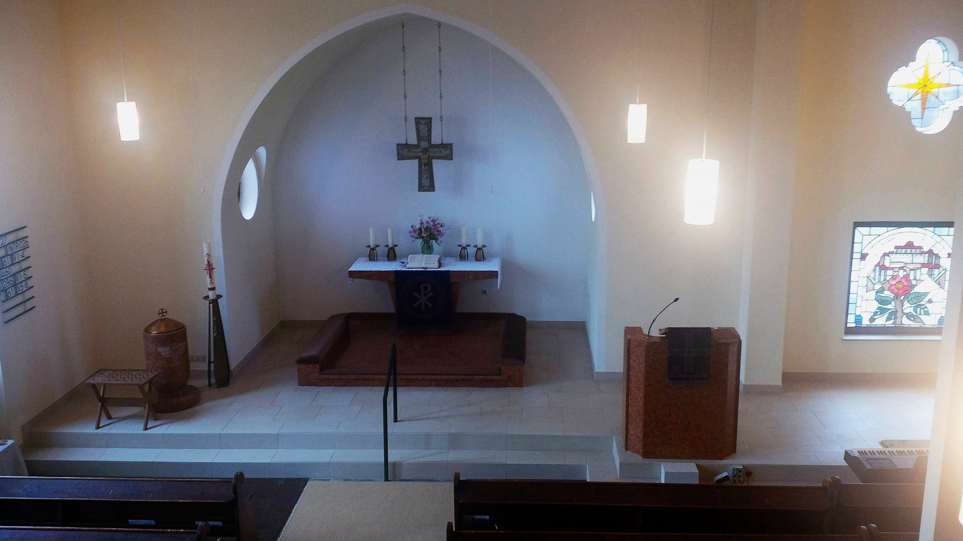 Zionskirche in Allendorf/Lumda, Landkreis Gießen, Hessen, Deutschland